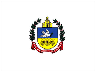 Bandeira do Município de Igrejinha, RS, Brasil